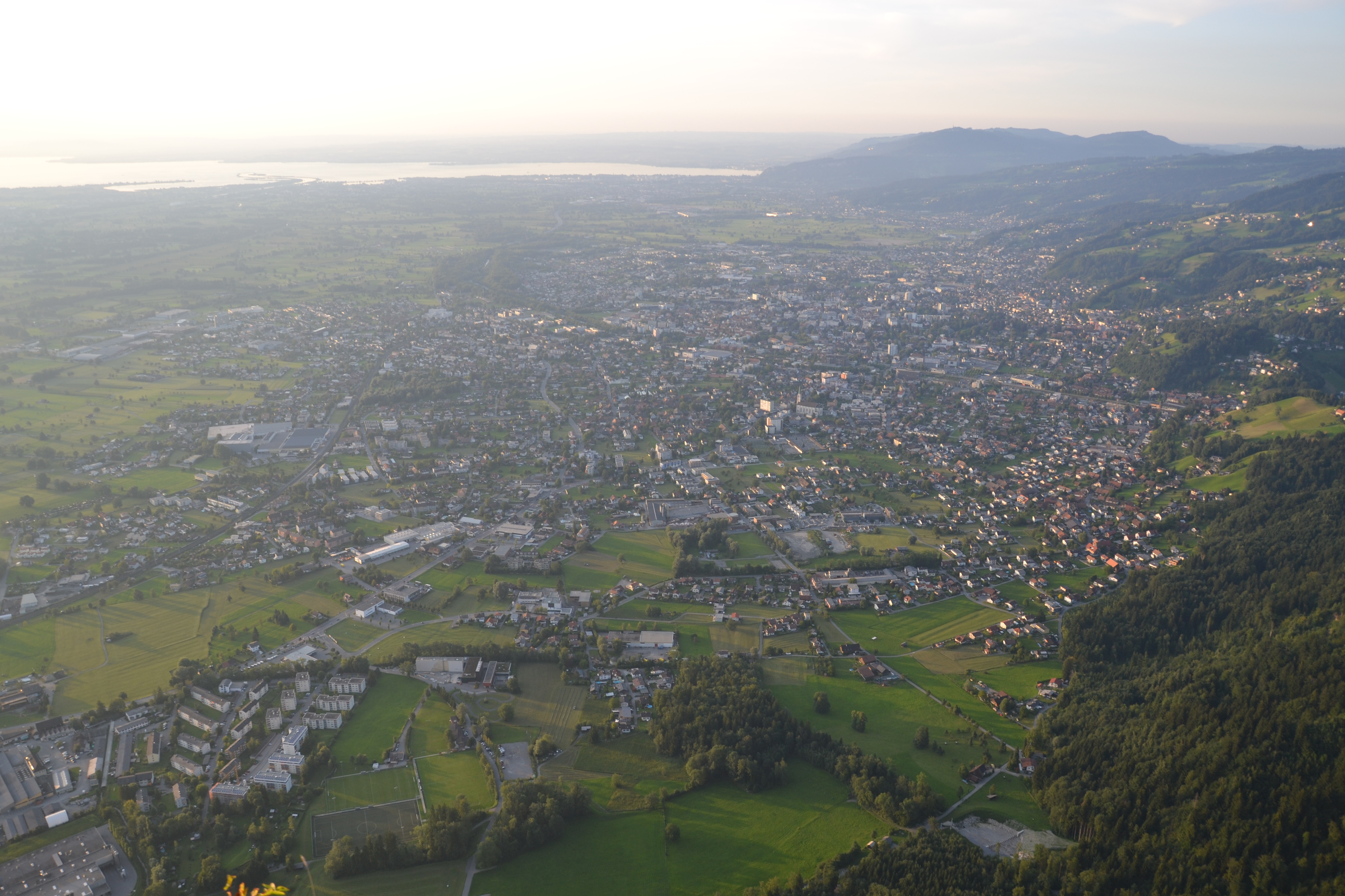 Blick auf die österreichische Stadt Dornbirn vom Breitenberg aus. Im Hintergrund erkennt man den Bodensee bei Bregenz.